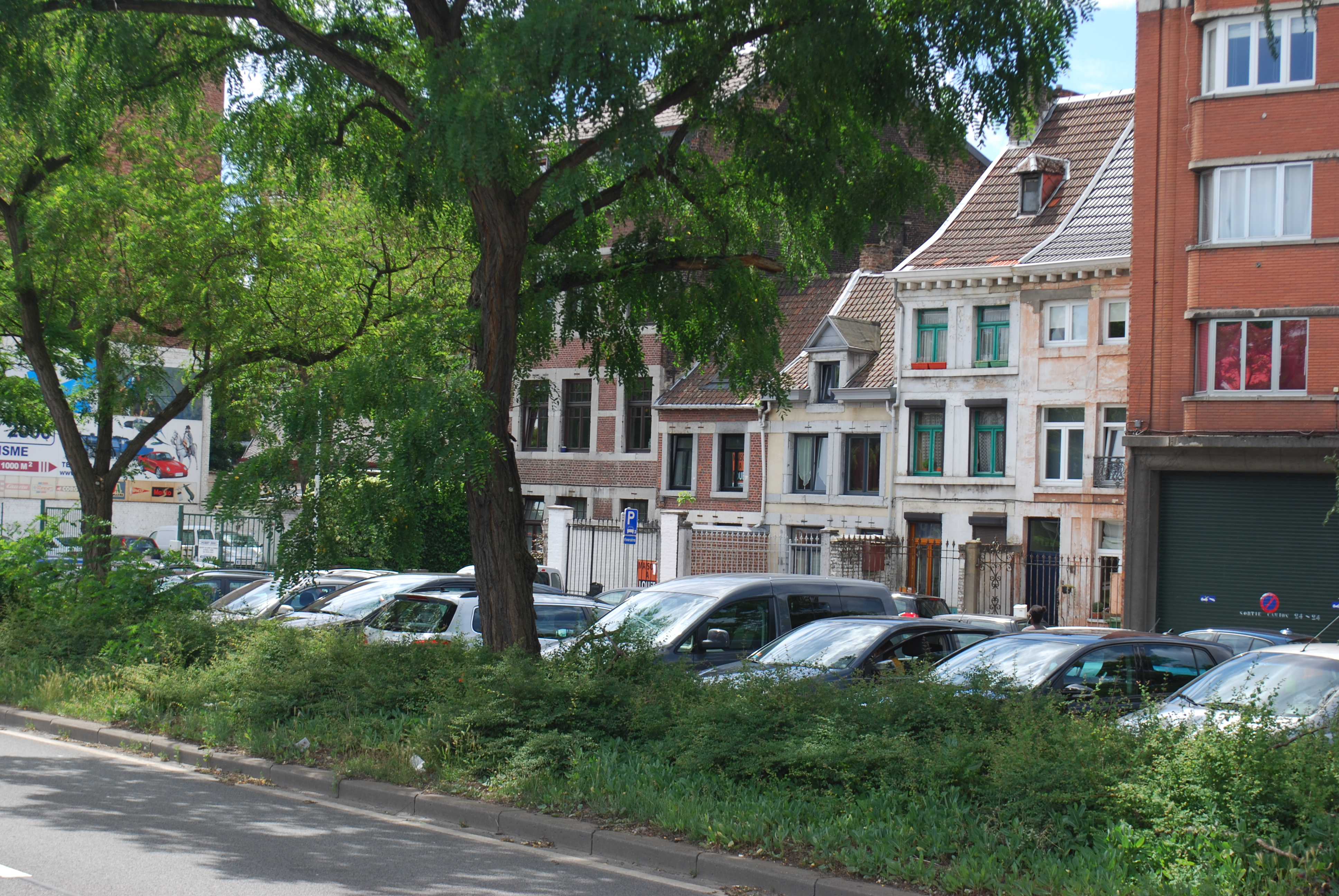 Vue des quais de la Dérivation de la Meuse à Liège, entre le pont des Vennes et le pont de Huy.